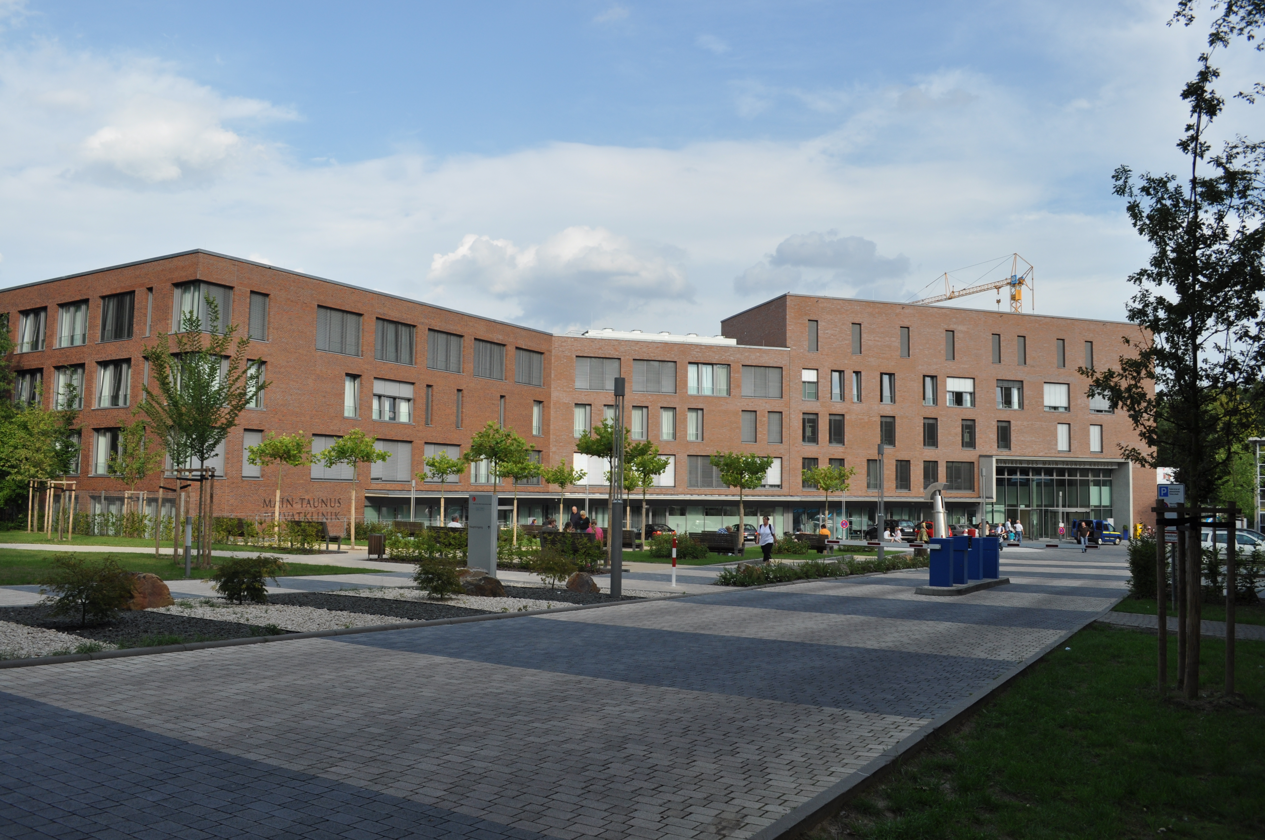 Kliniken des Main-Taunus-Kreises, Bad Soden am Taunus, Haupteingang